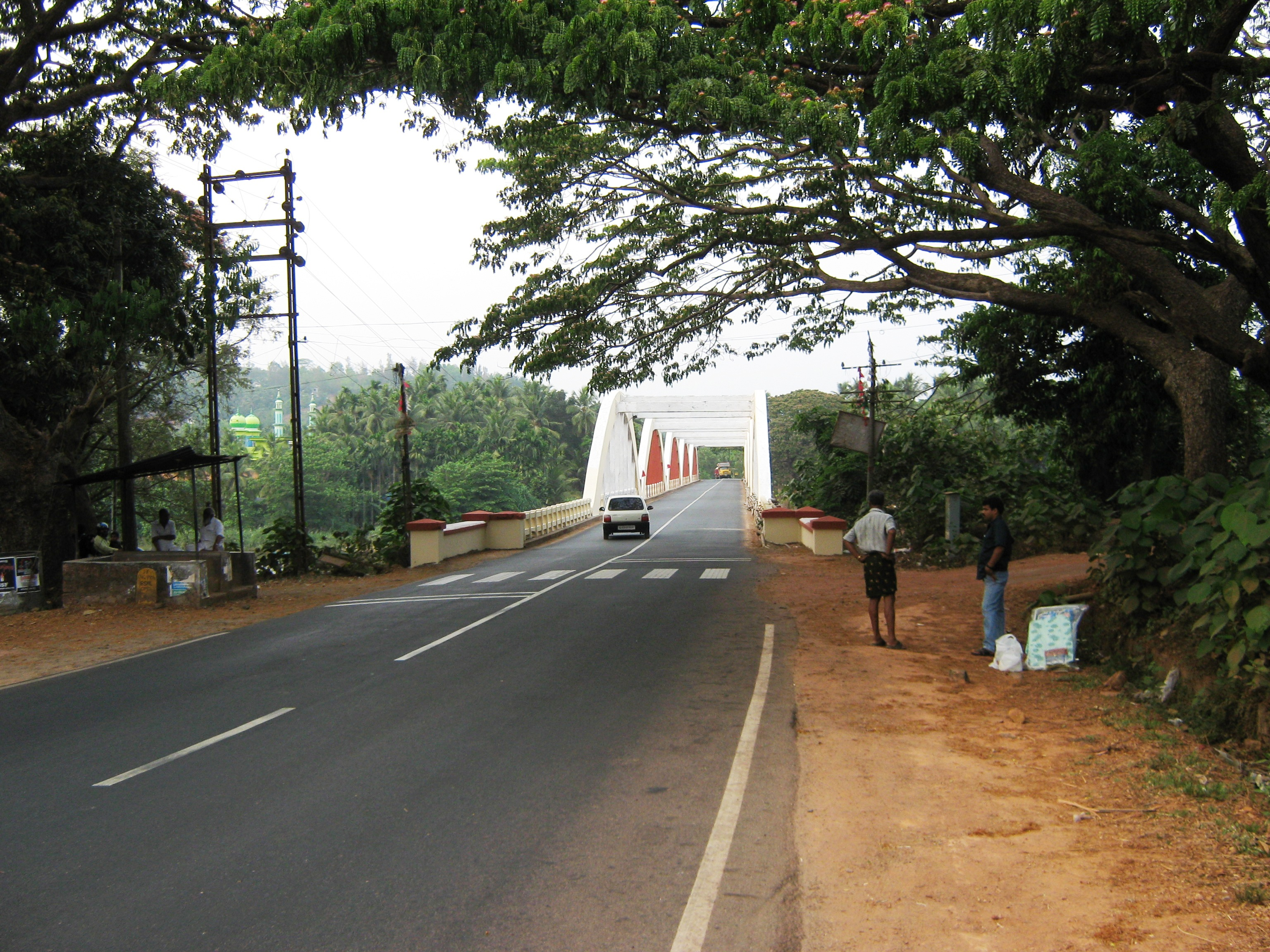 Kerala, India.